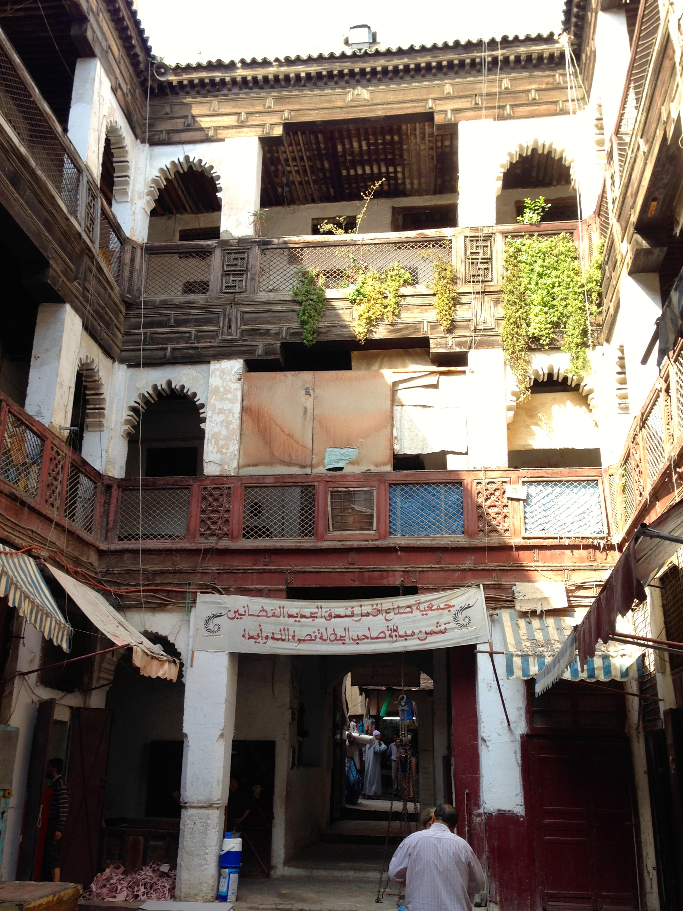 Foundouk Kettanine, Fes